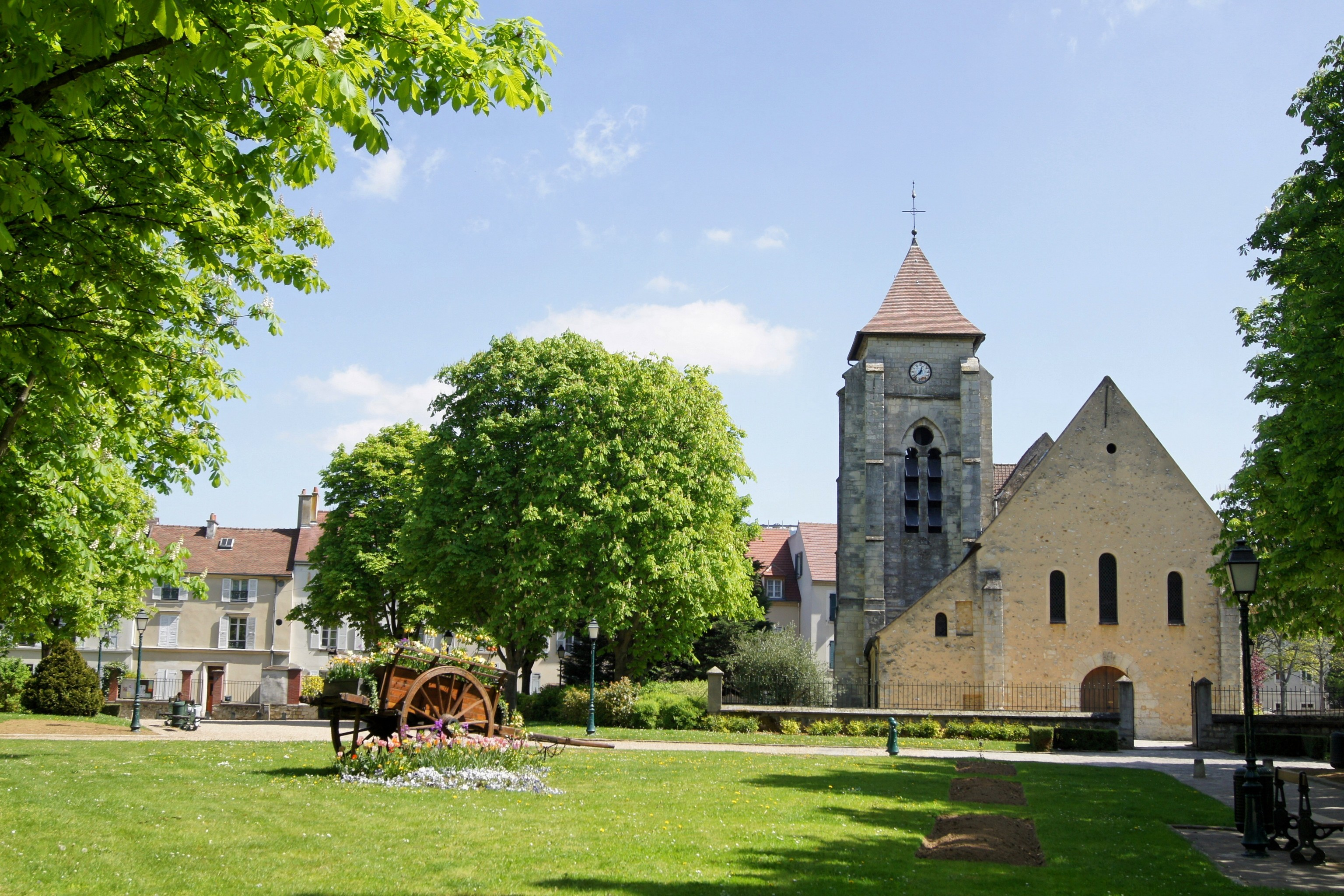 L'église de Chevilly Larue (94)